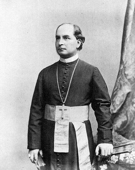 Fraknói Vilmos portréja. 1880-ban készült fénykép, a MEK oldaláról: (Kettős kötődés : Az Osztrák-Magyar Monarchia (1867-1918)